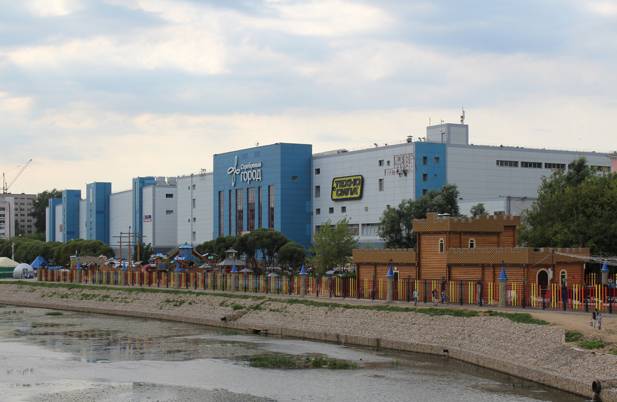 Медицинская академия в г. Иваново